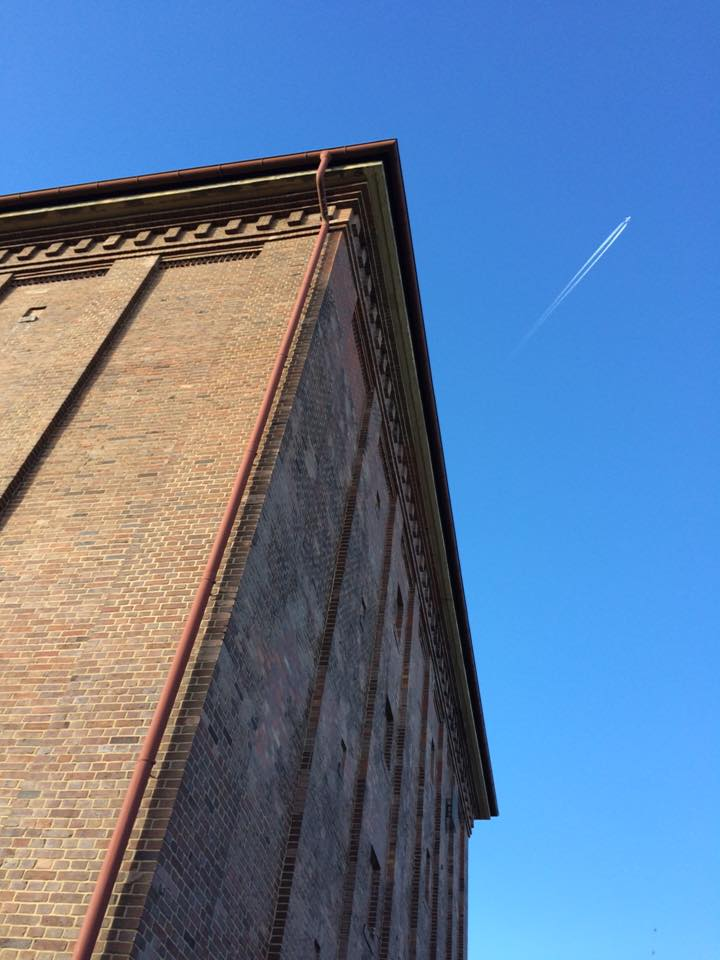 Bunkermuseum außen